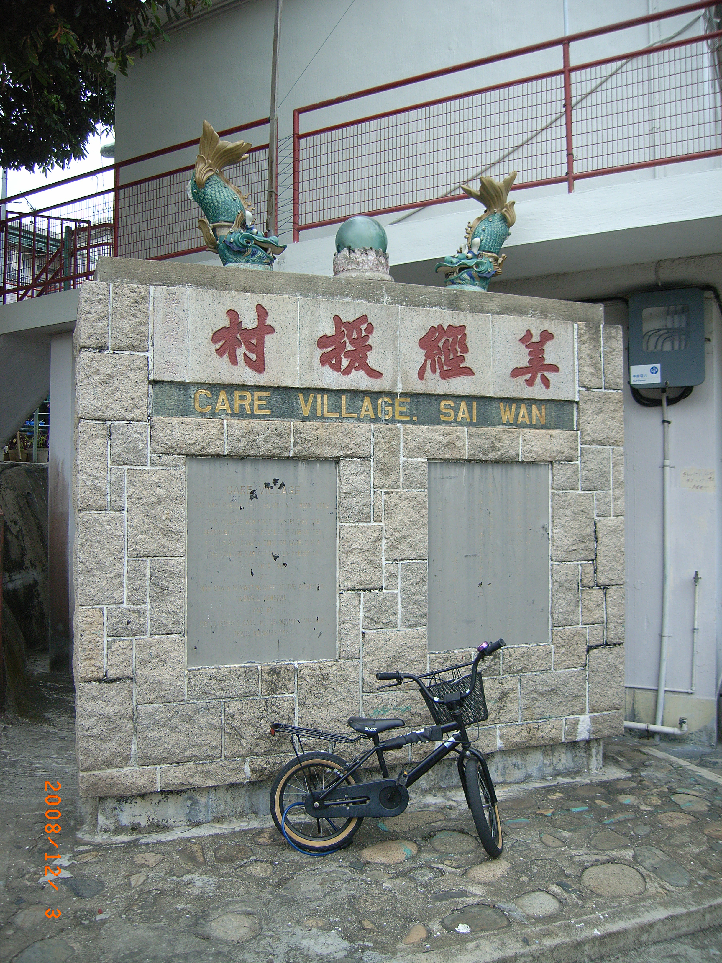 中文（香港）: 村口碑石